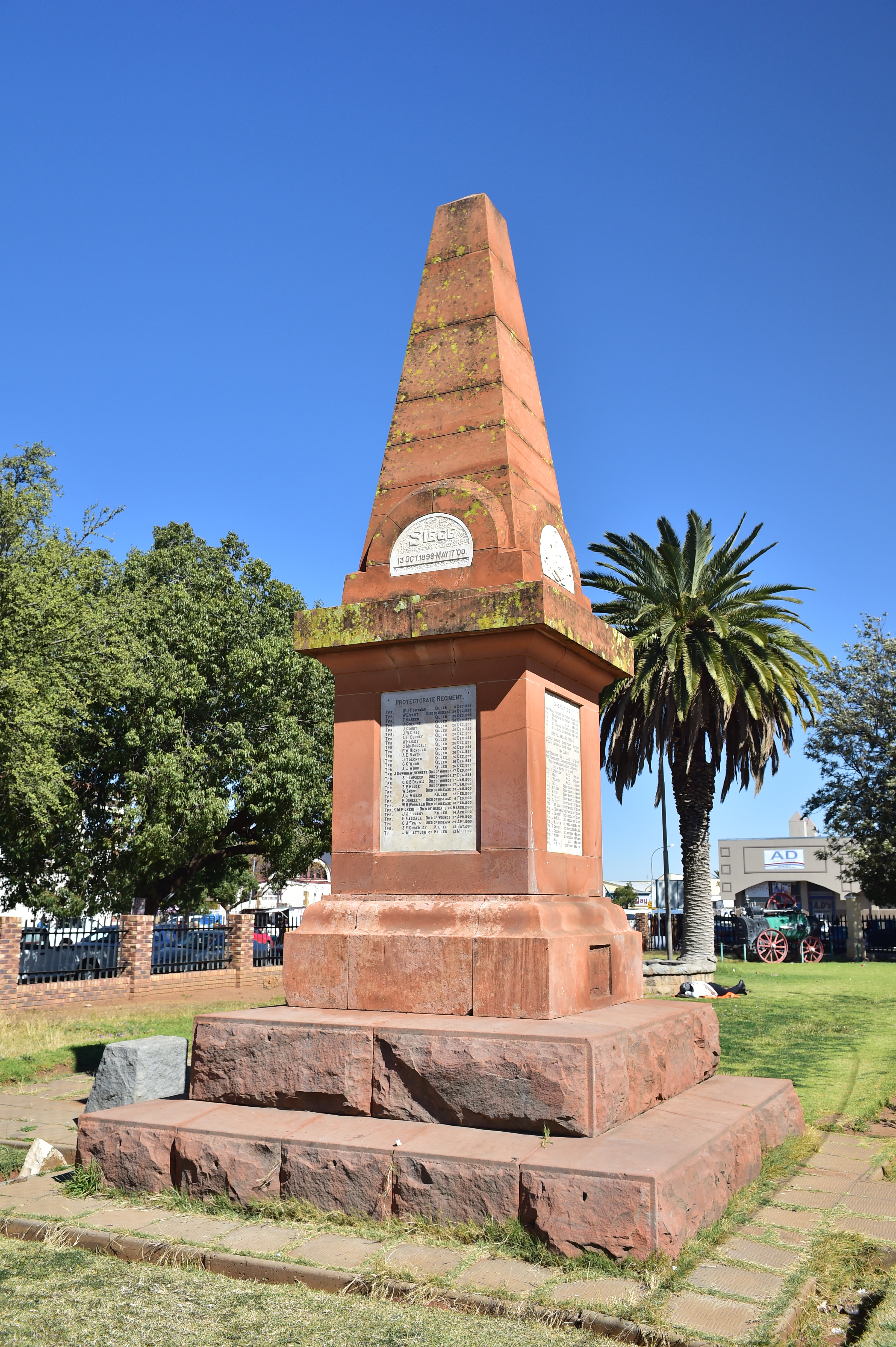 Vue du North West en Afrique du Sud.